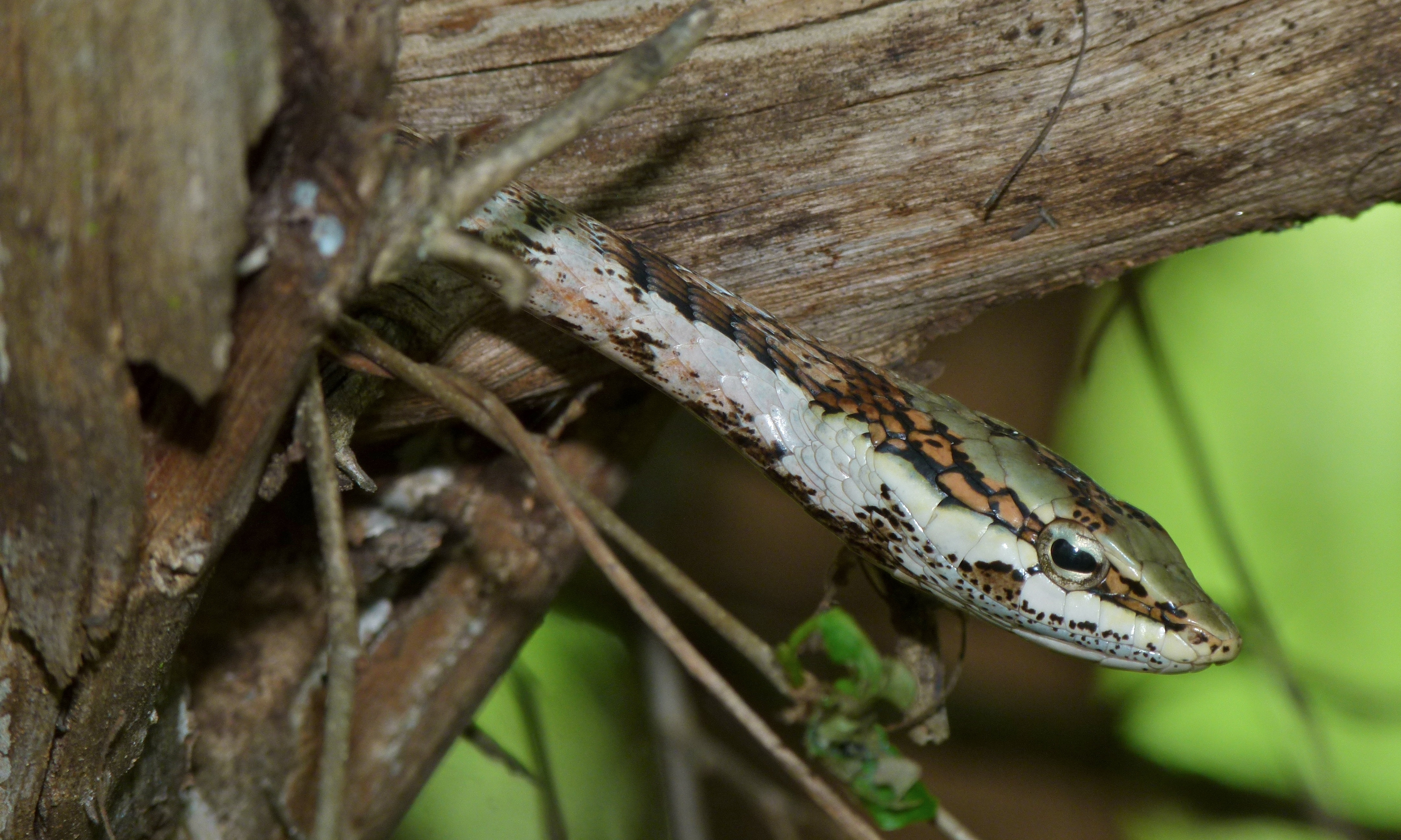 Skukuza Nursery Trail, Kruger NP, SOUTH AFRICA